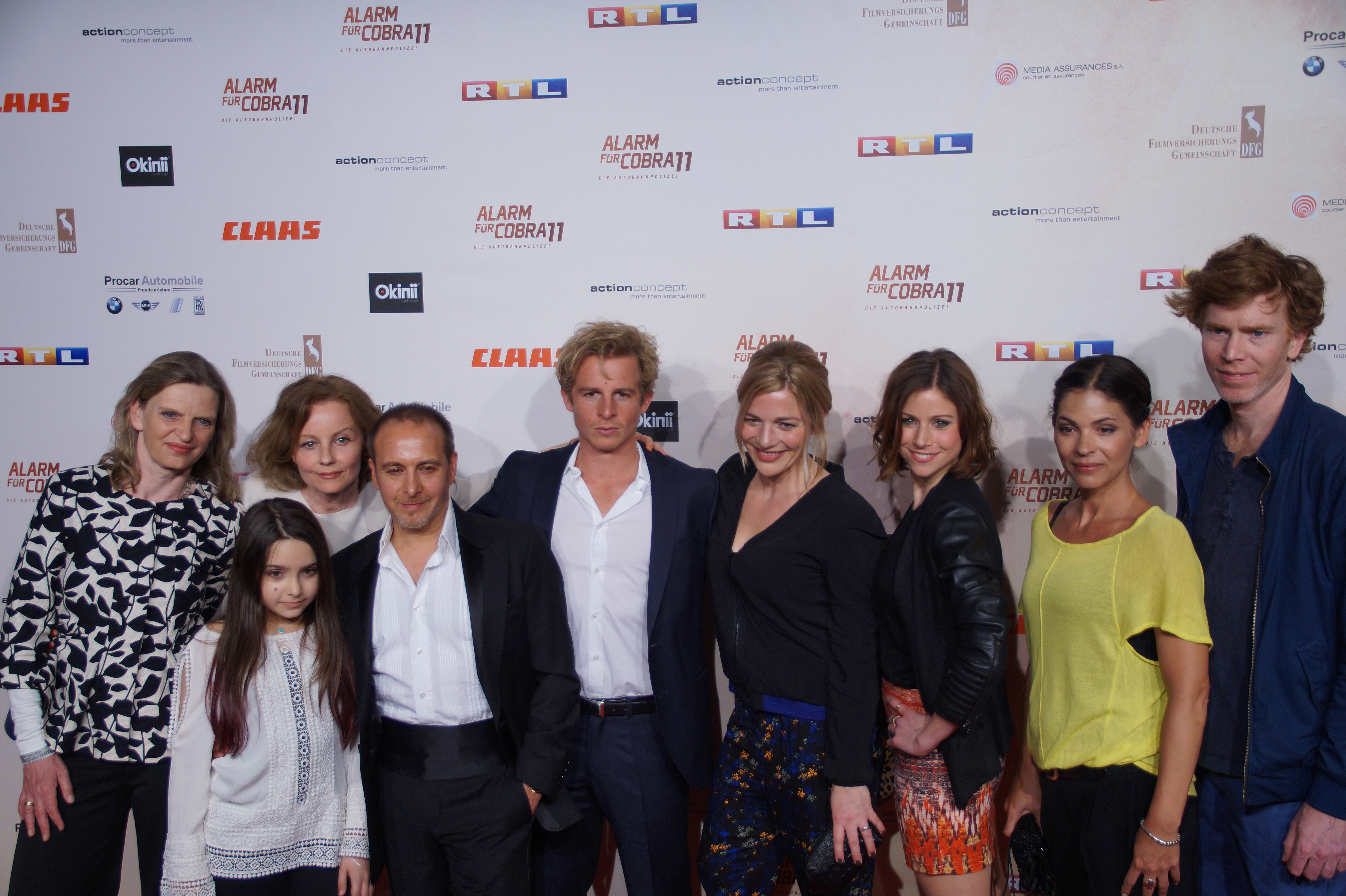 Cast von "Alarm für Cobra 11" bei der Premiere von der 300. Folge 'Alarm für Cobra 11', April 2016.